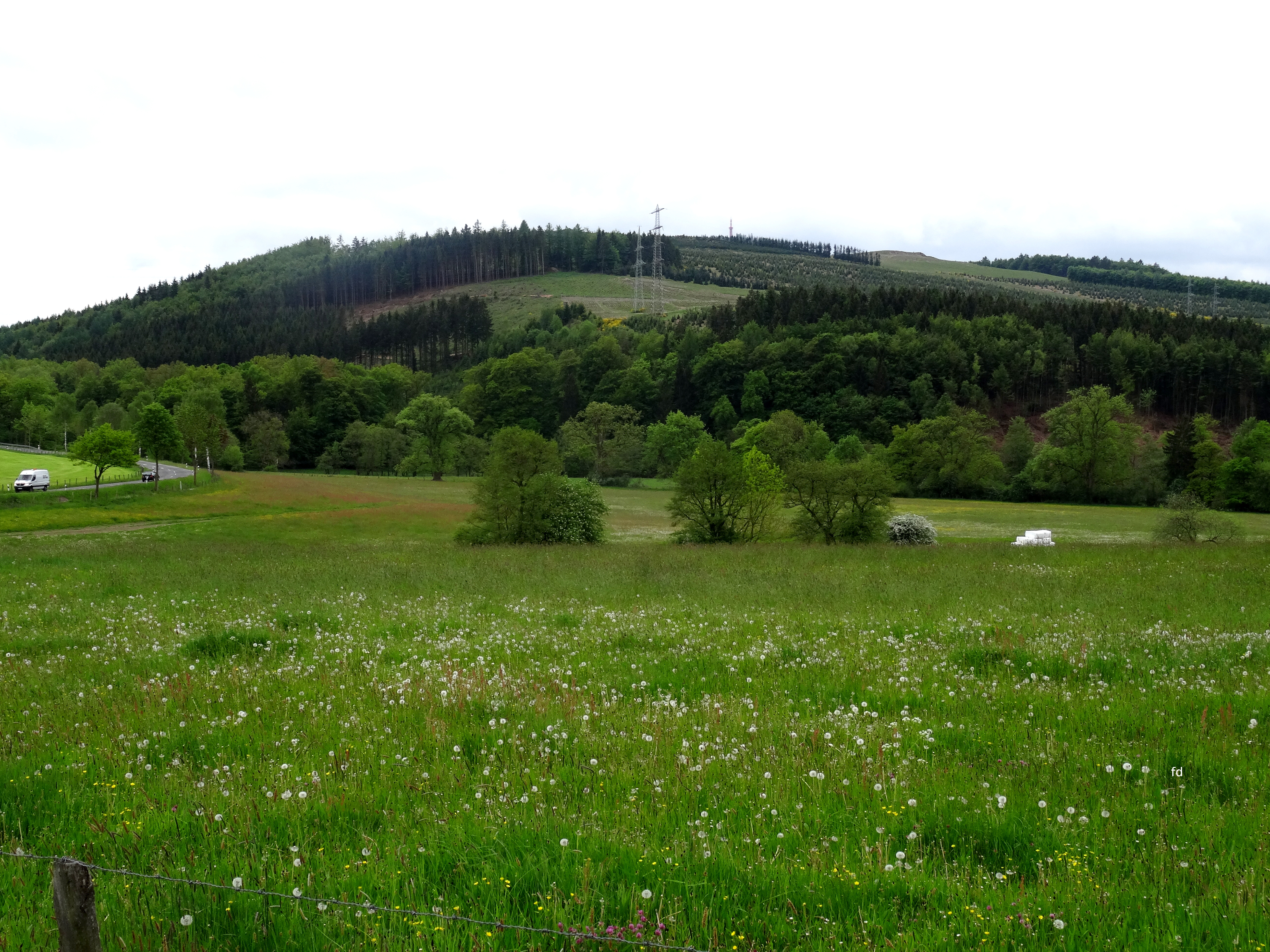 Naturschutzgebiet „Elpetal bei Gevelinghausen“ (NSG HSK-276) in Olsberg (Grünland in Vordergrund mit Laubwaldrand).